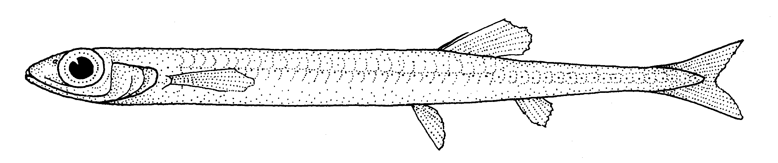 Microstoma microstoma (Slender argentine)